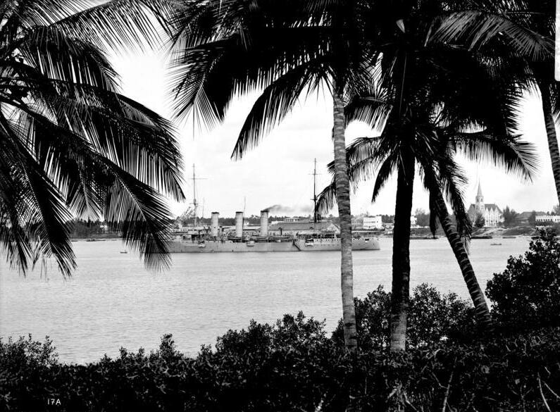 Daressalam m. S.M.S. Königsberg